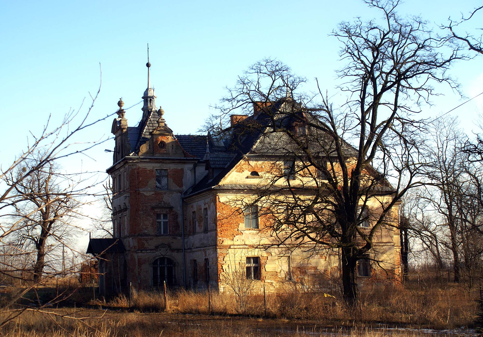 Obórki, dwór (nr 64), 1830, 1888